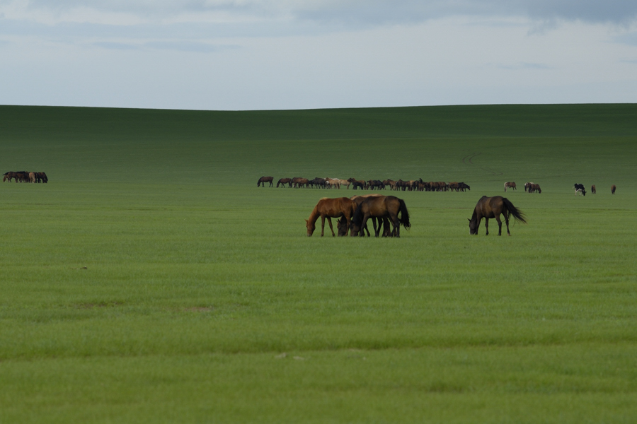 Horses in Zhalatu, Old Barag Banner